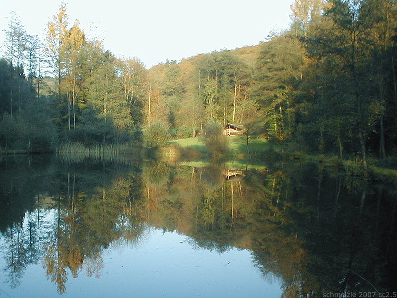 Waldsee bei Neckargerach, Baden-Württemberg, Deutschland